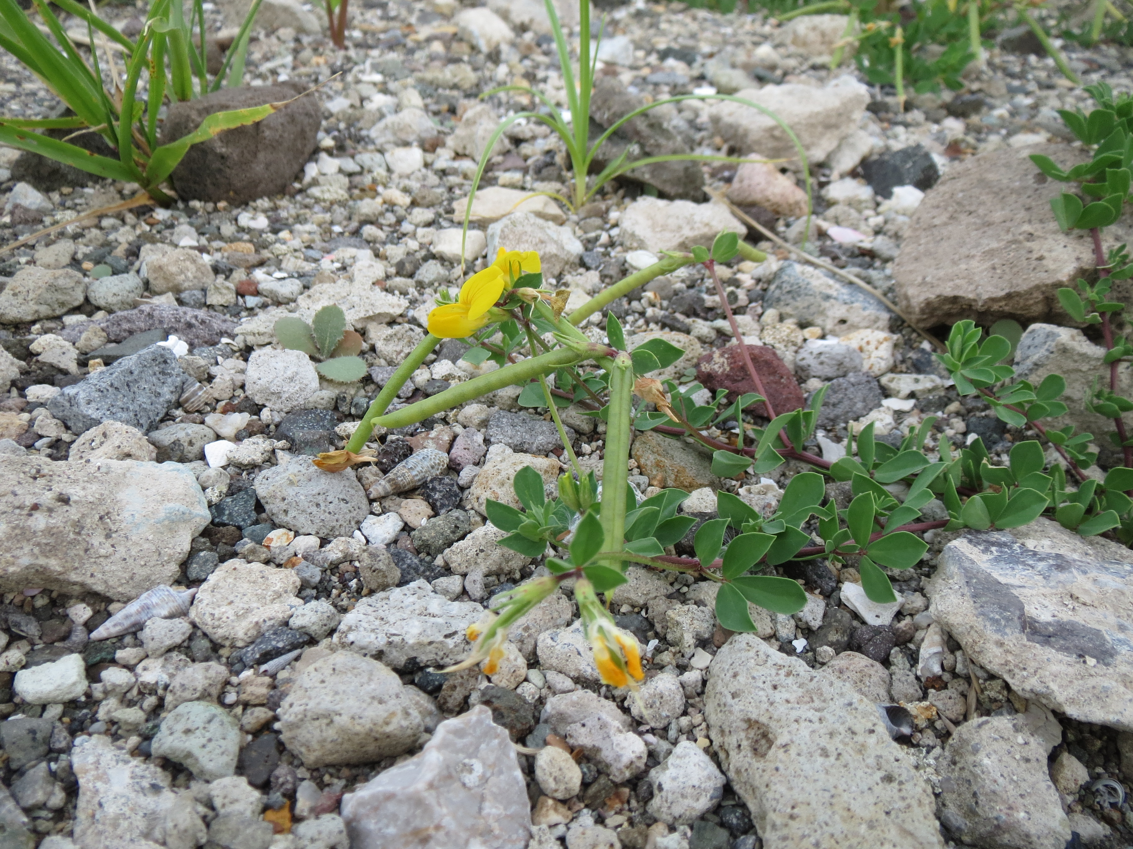 Lotus japonicus 2016 July